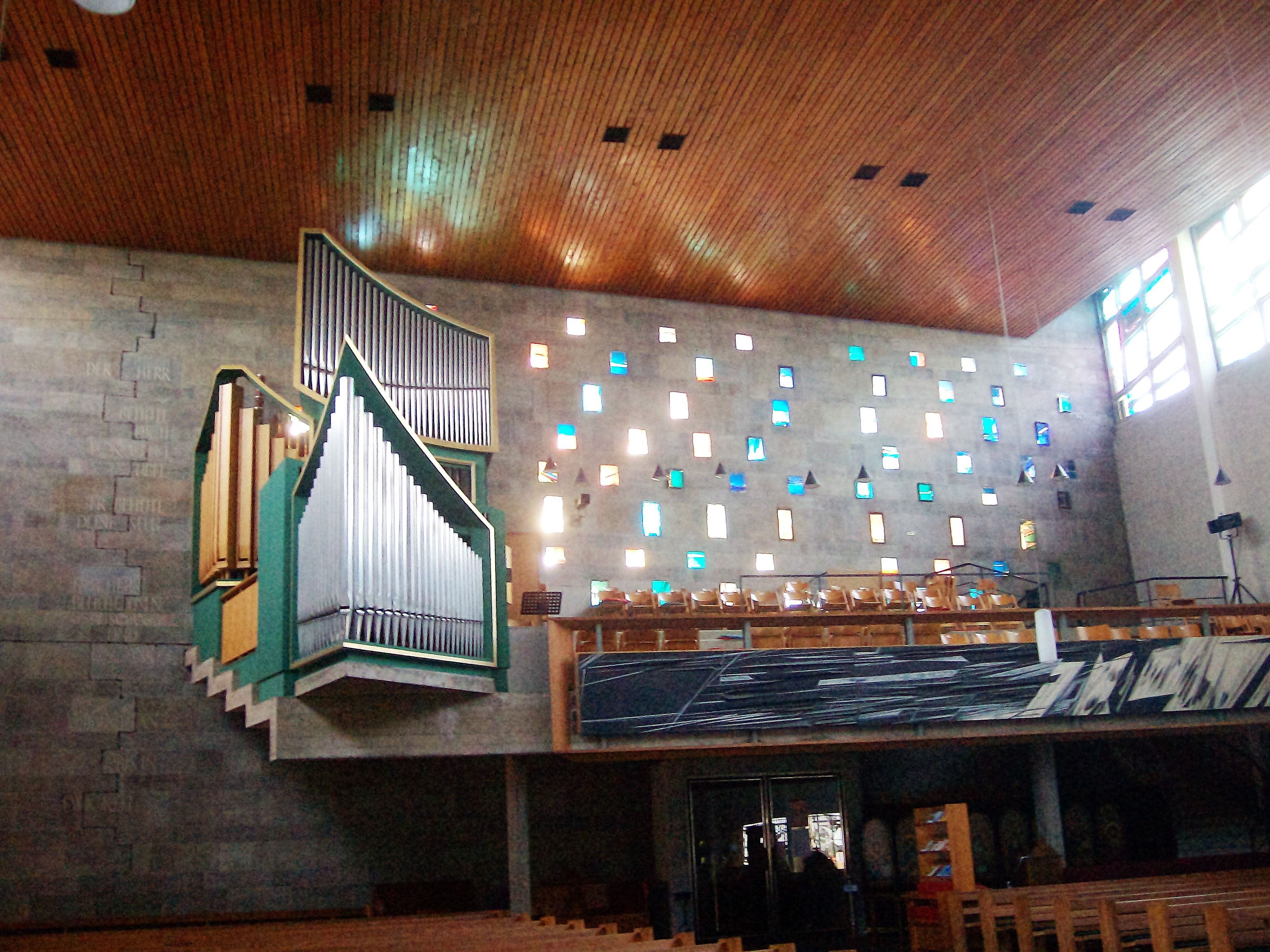 Petruskirche, Gießen, Hessen, Deutschland